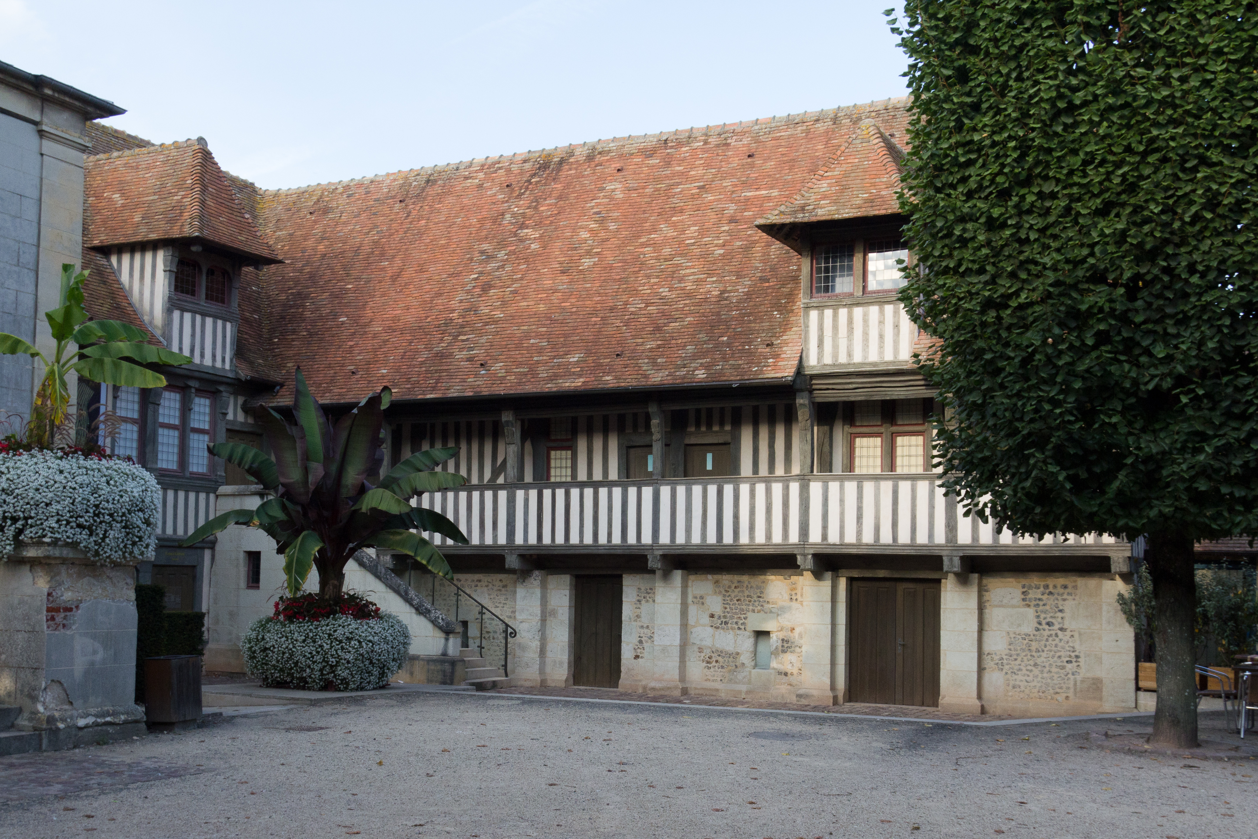 Façade de l'ancien couvent des Dominicains de l'Isle de Pont-l'Évêque. .